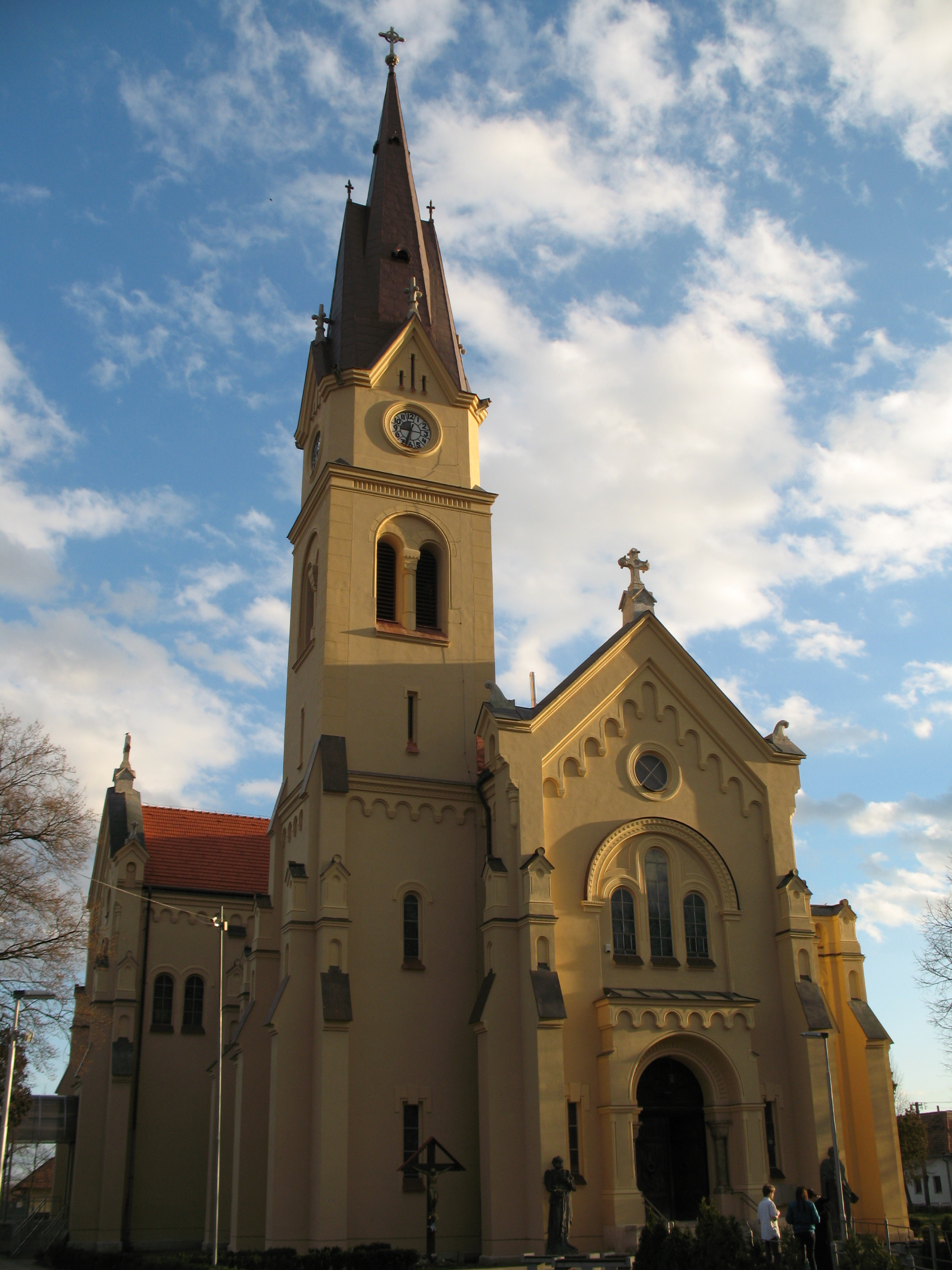 Verebély